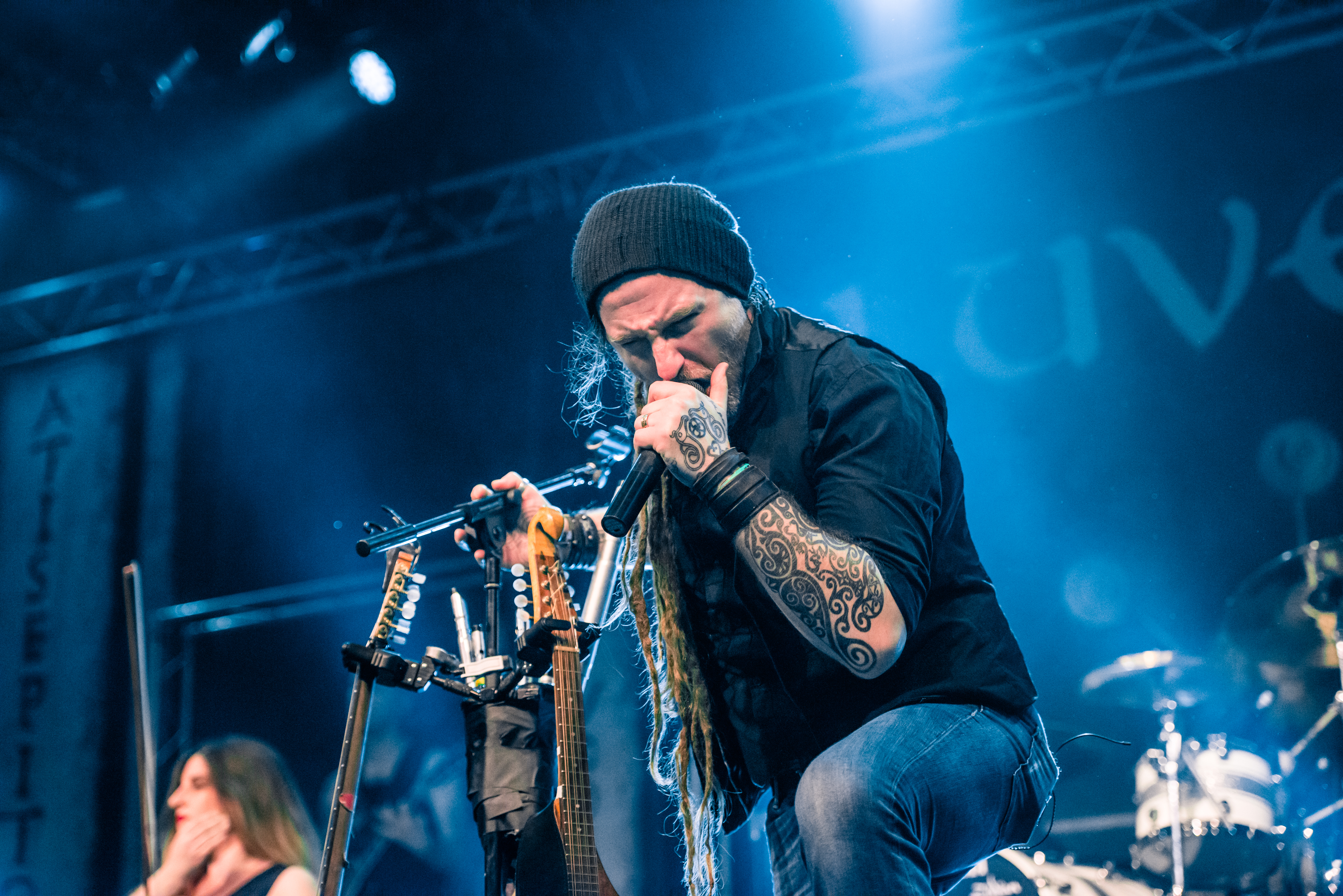 'Eluveitie - Epic Metal Fest - Eindhoven'